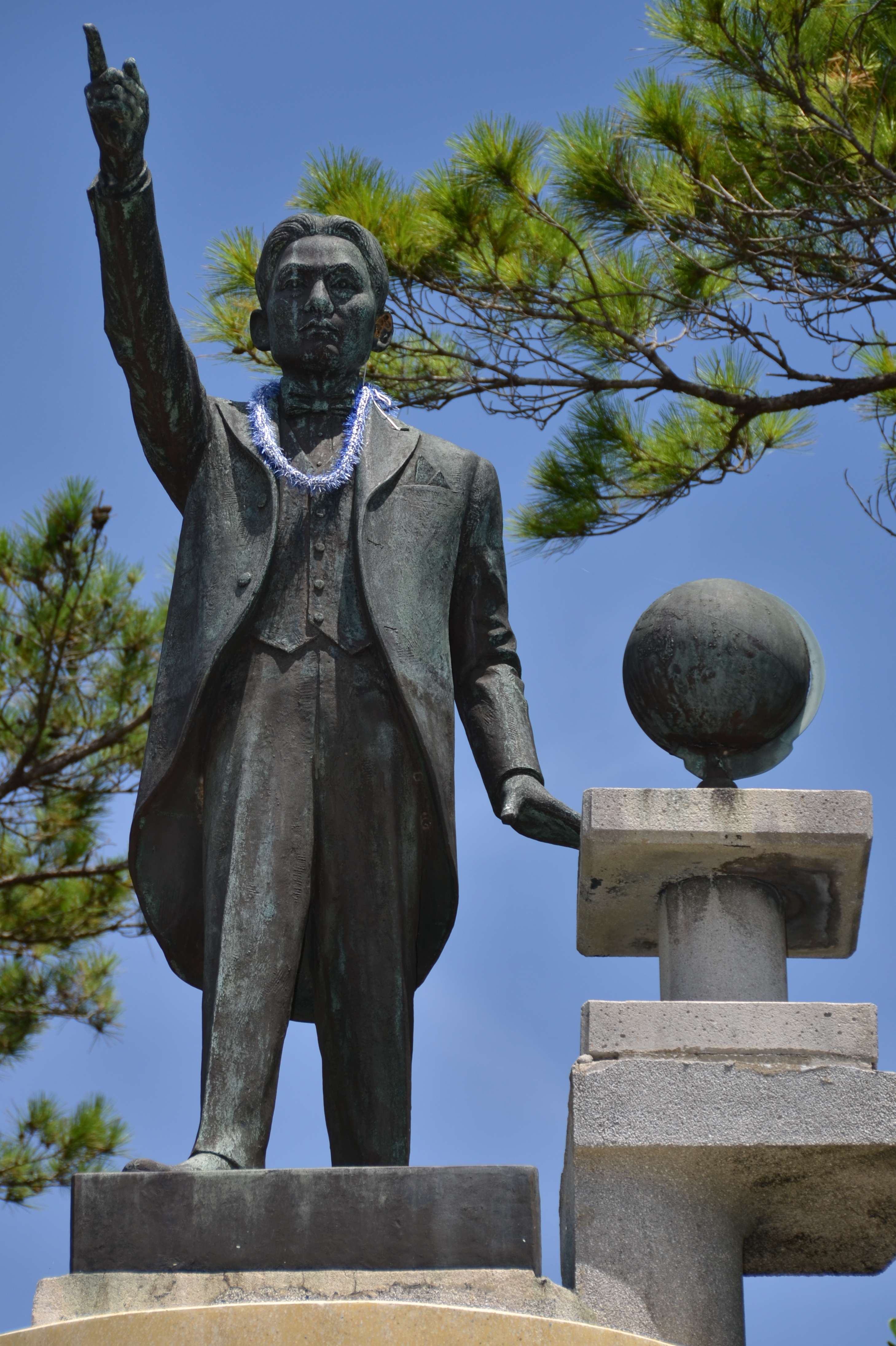 沖縄県金武町にある、ハワイ移民の父・當山久三の銅像。